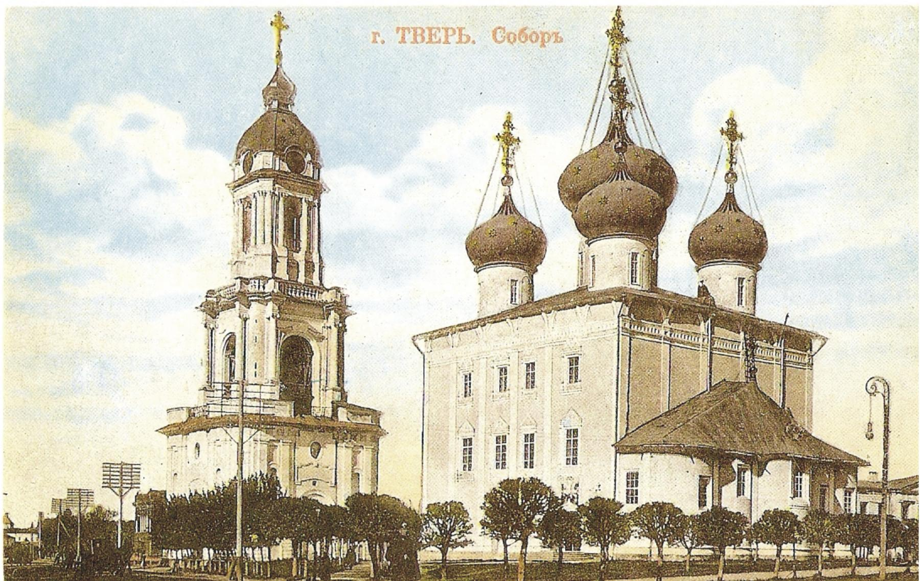 Спасо-Преображенский собор (Тверь)